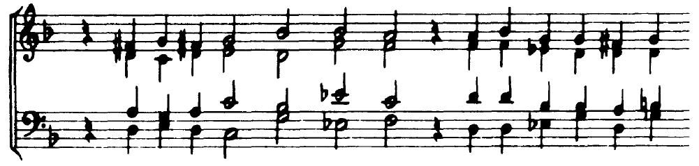 Винценцо Галилей. Образец гармонизации мелодии (из трактата "Dubbi...", 1591)